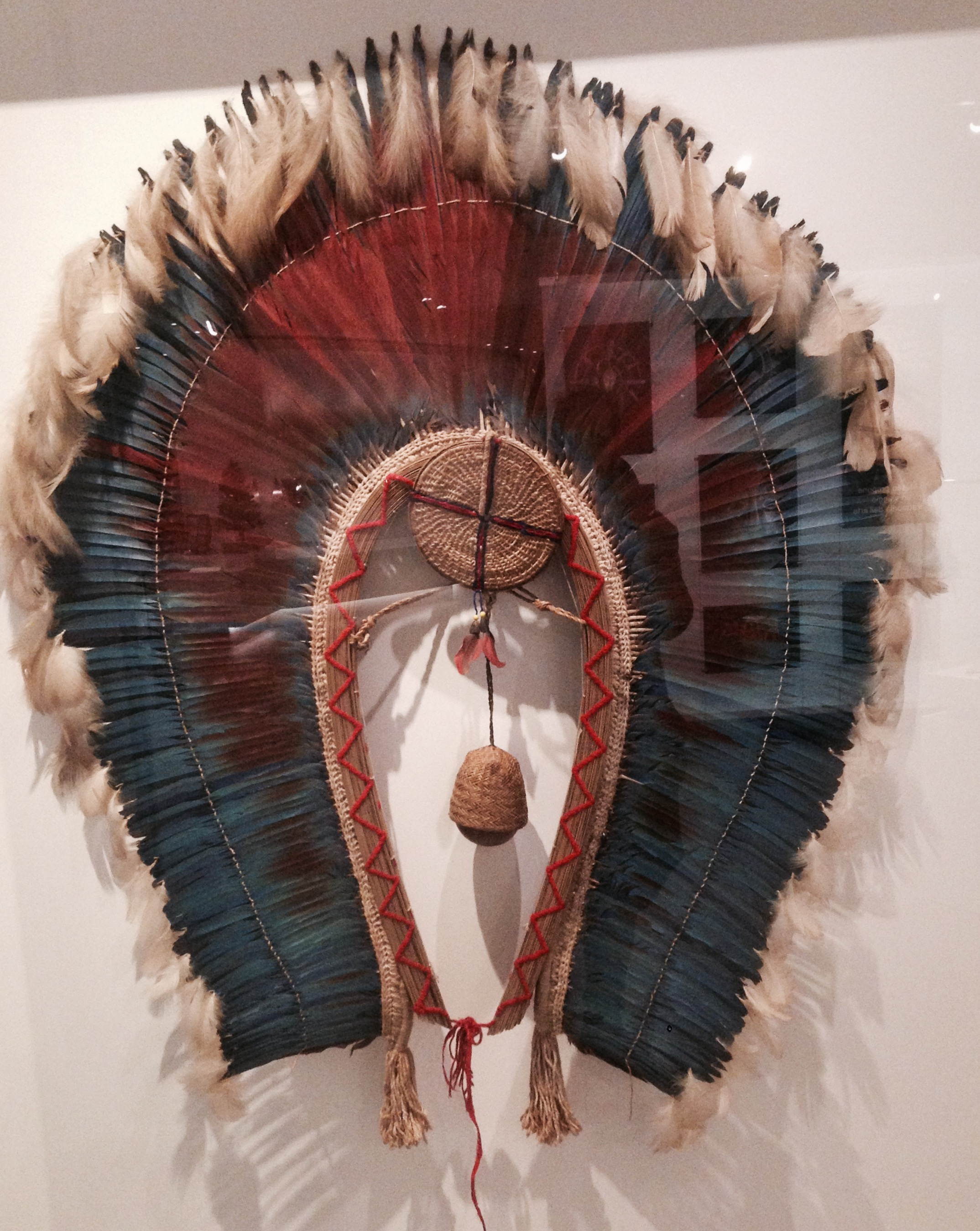 Diadema del popolo amazzonico dei Kayapo'